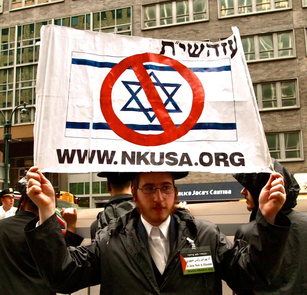 anti-zionist jews